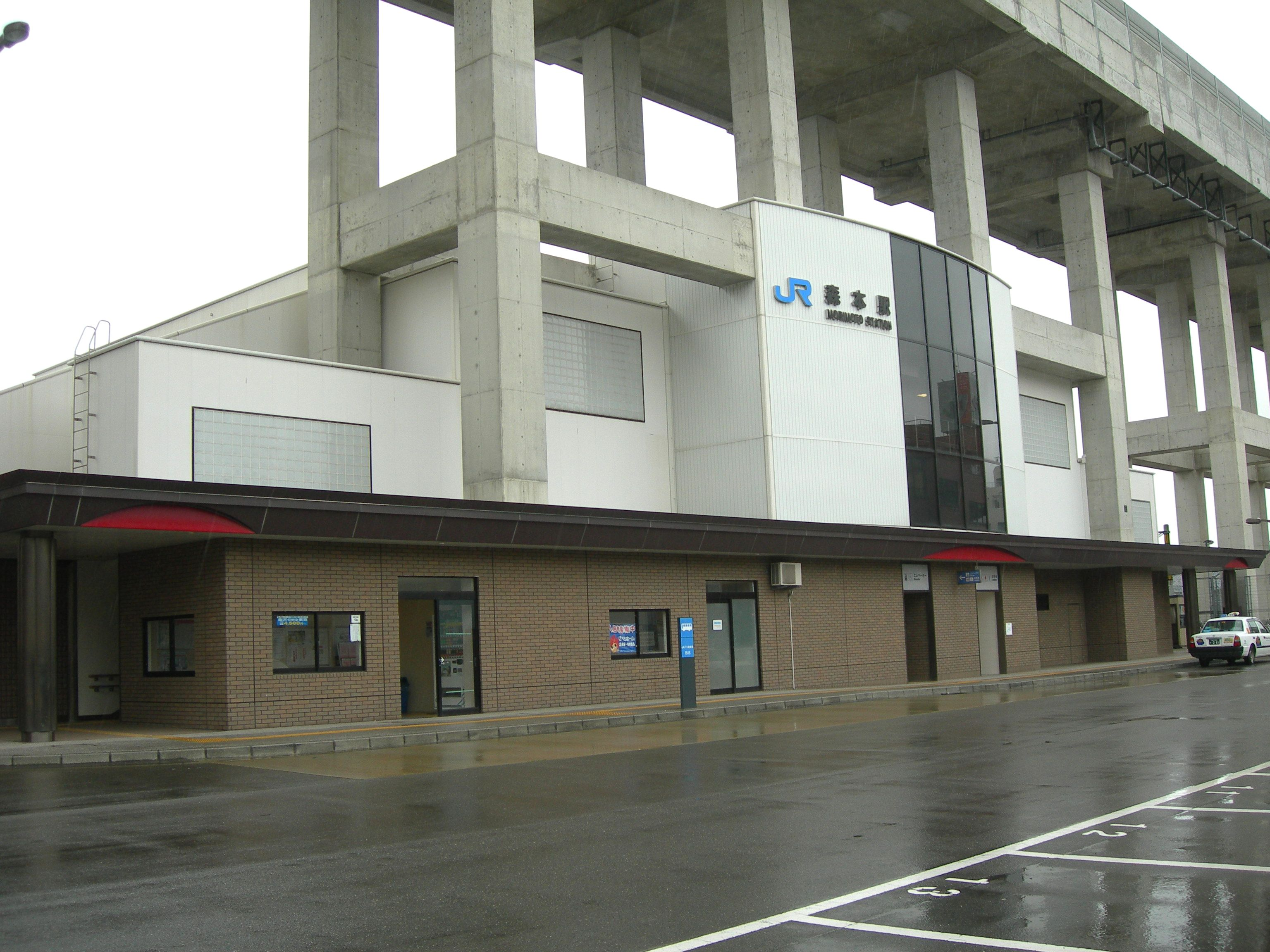 森本駅